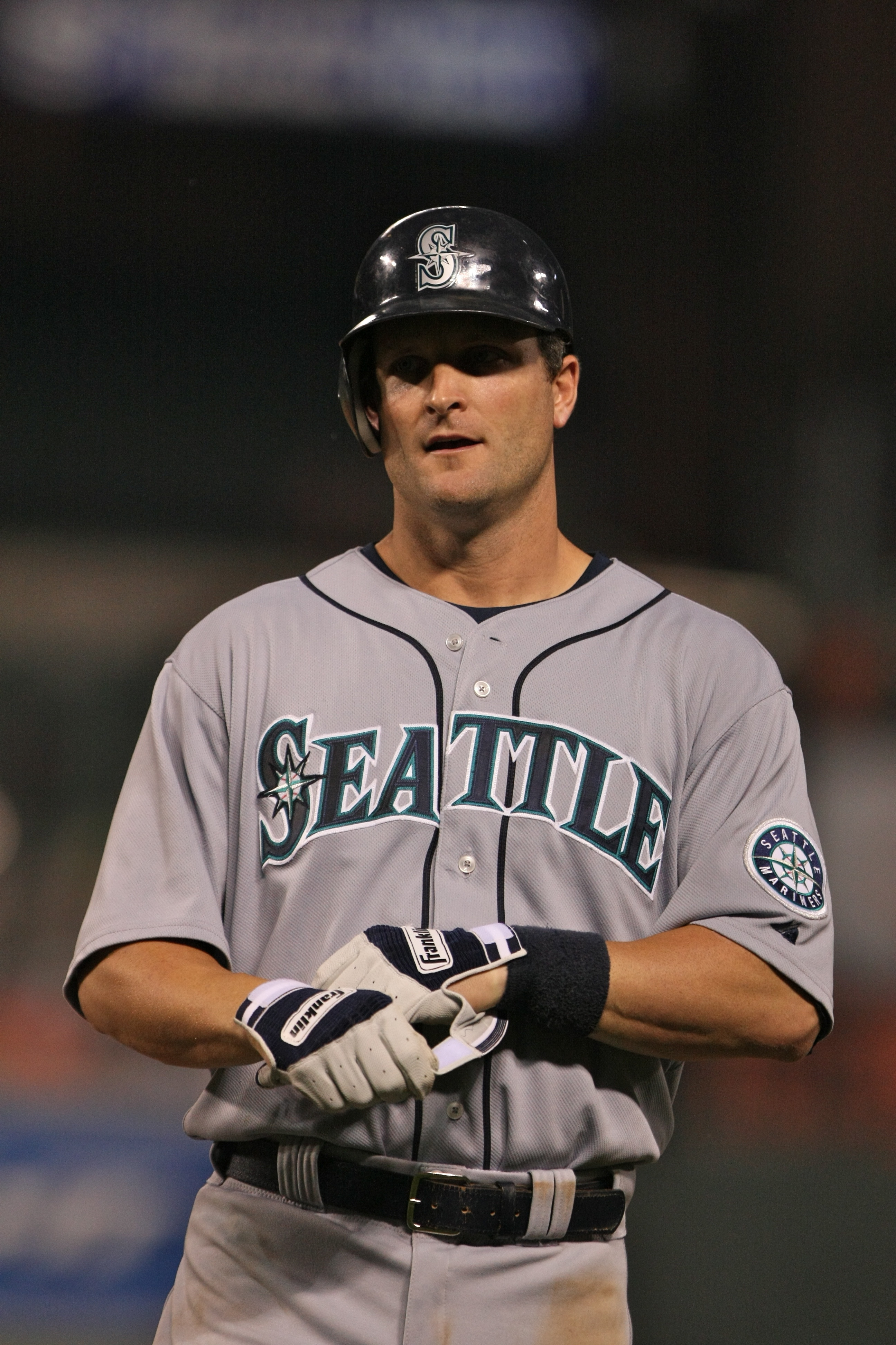 Russell Branyan